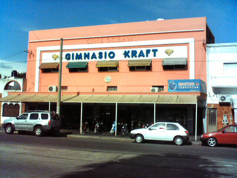 Ex Cine Ocean. Rosario, Argentina.